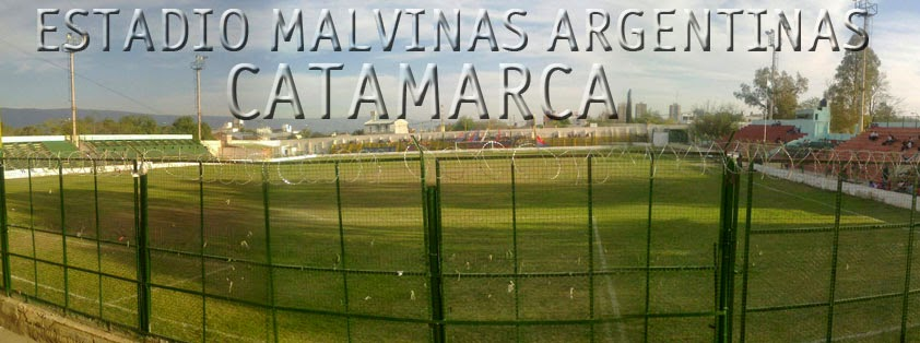 Estadio Malvinas Argentinas - Liga Catamarqueña de Futbol